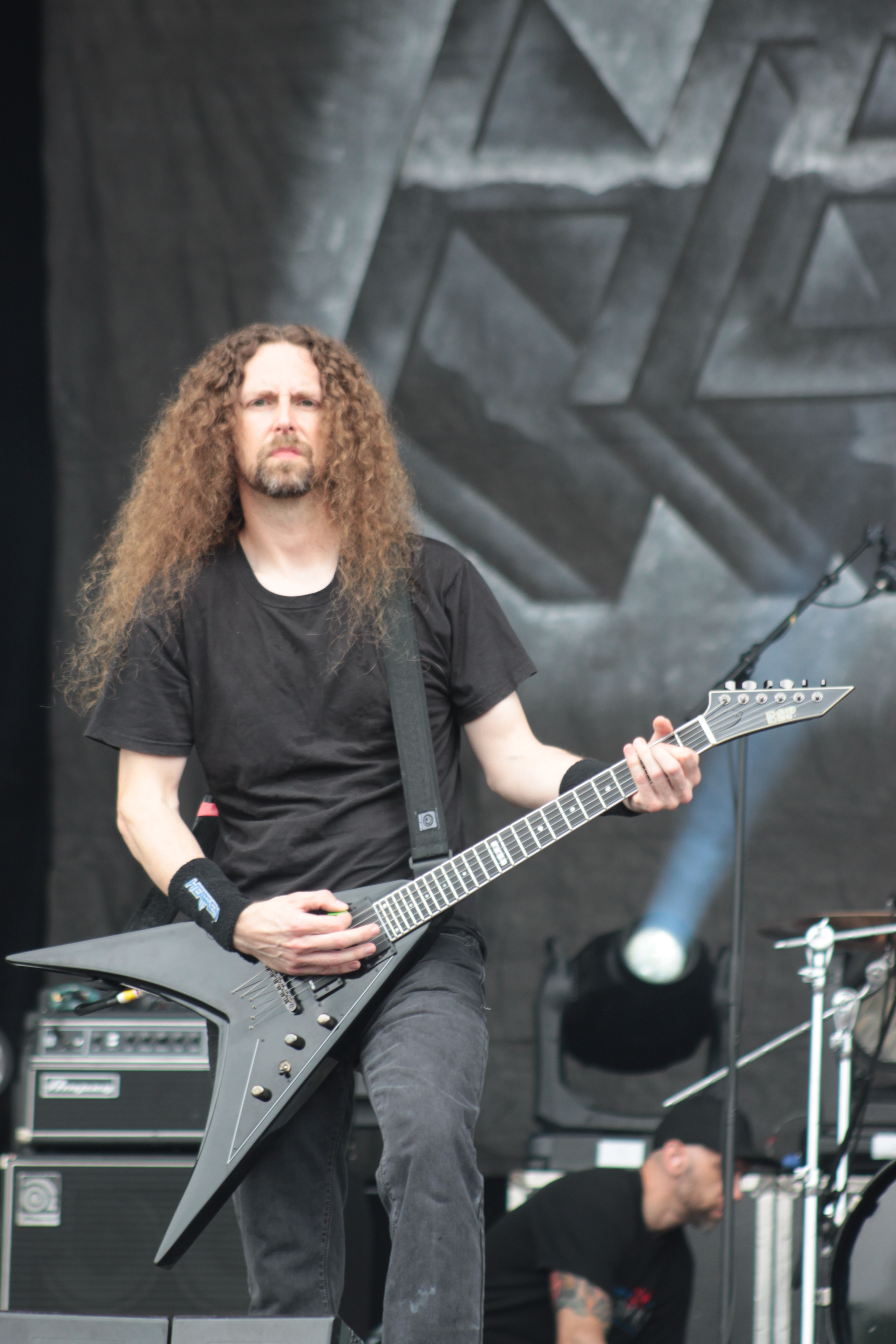 Kragen Lum, Heaven, Helfest 2013, Fr-44-Clisson.